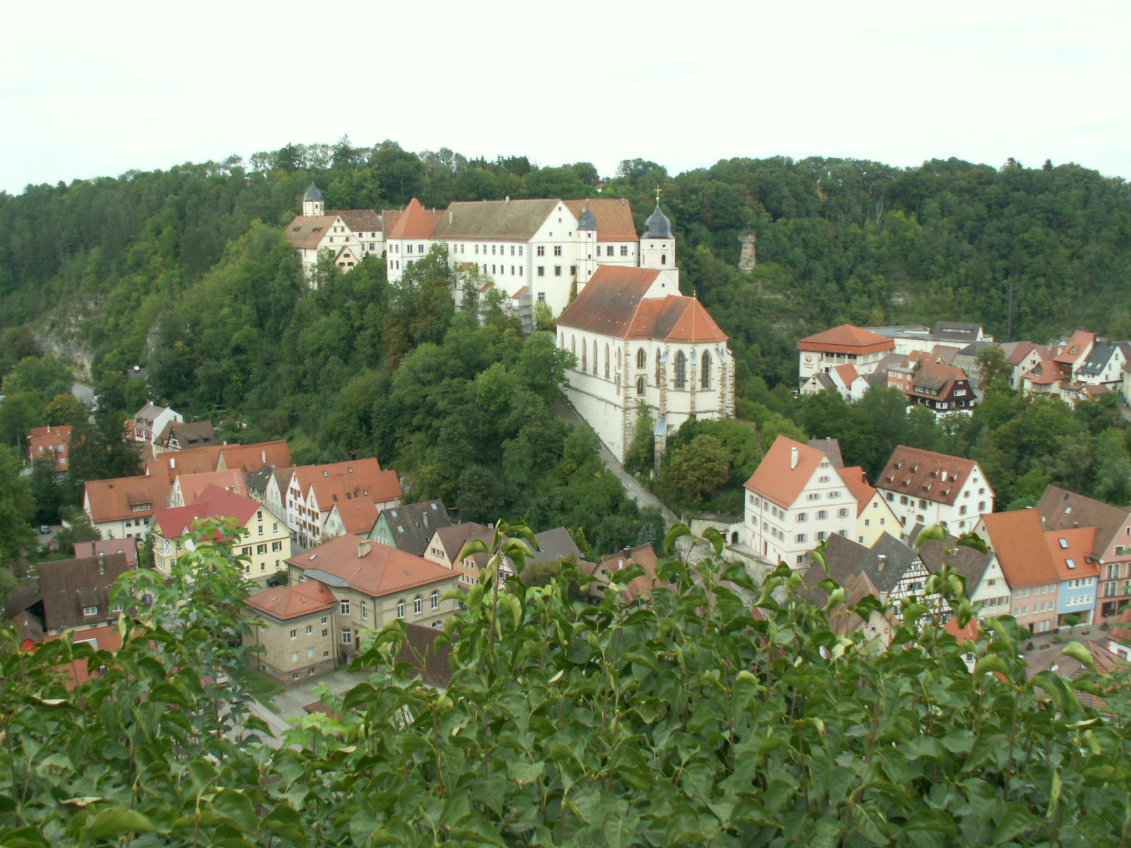 Haigerloch Castle Germany